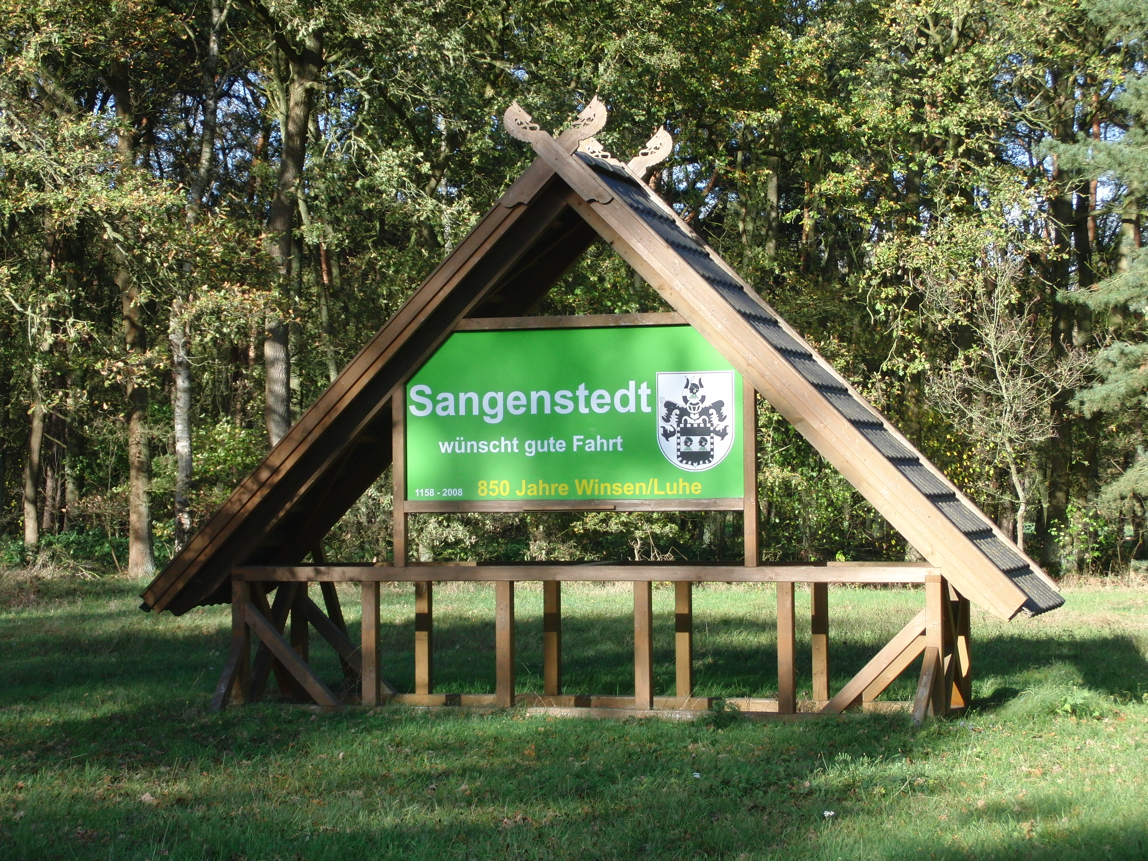 Willkommensschild des Dorfes Sangenstedt